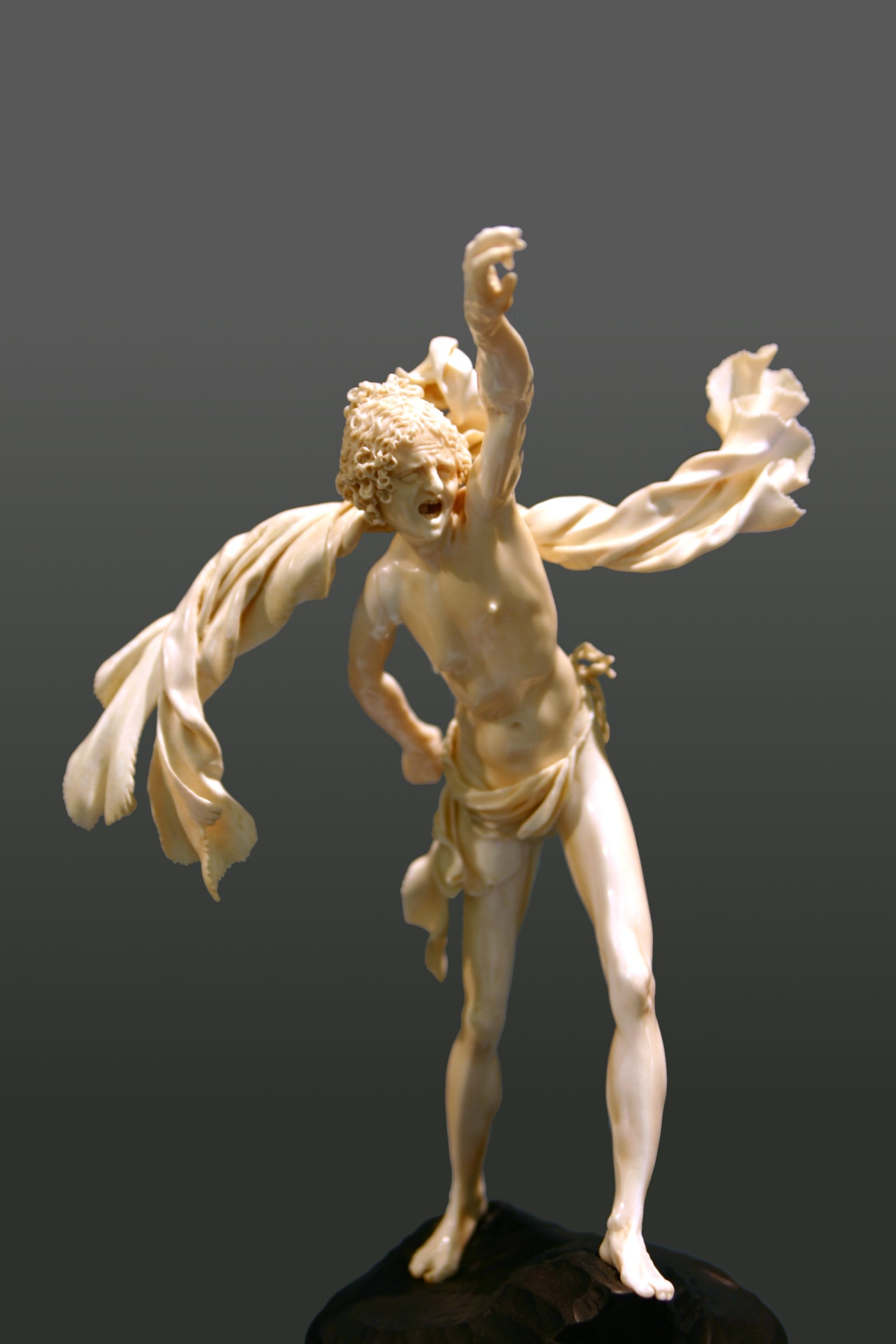 Furie. Salzburg(?). um 1610/20. Statuette. Elfenbein